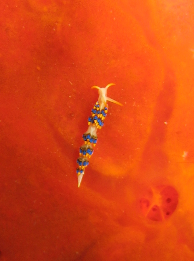 Cuthona caerulea en Méditerranée près de Banyuls